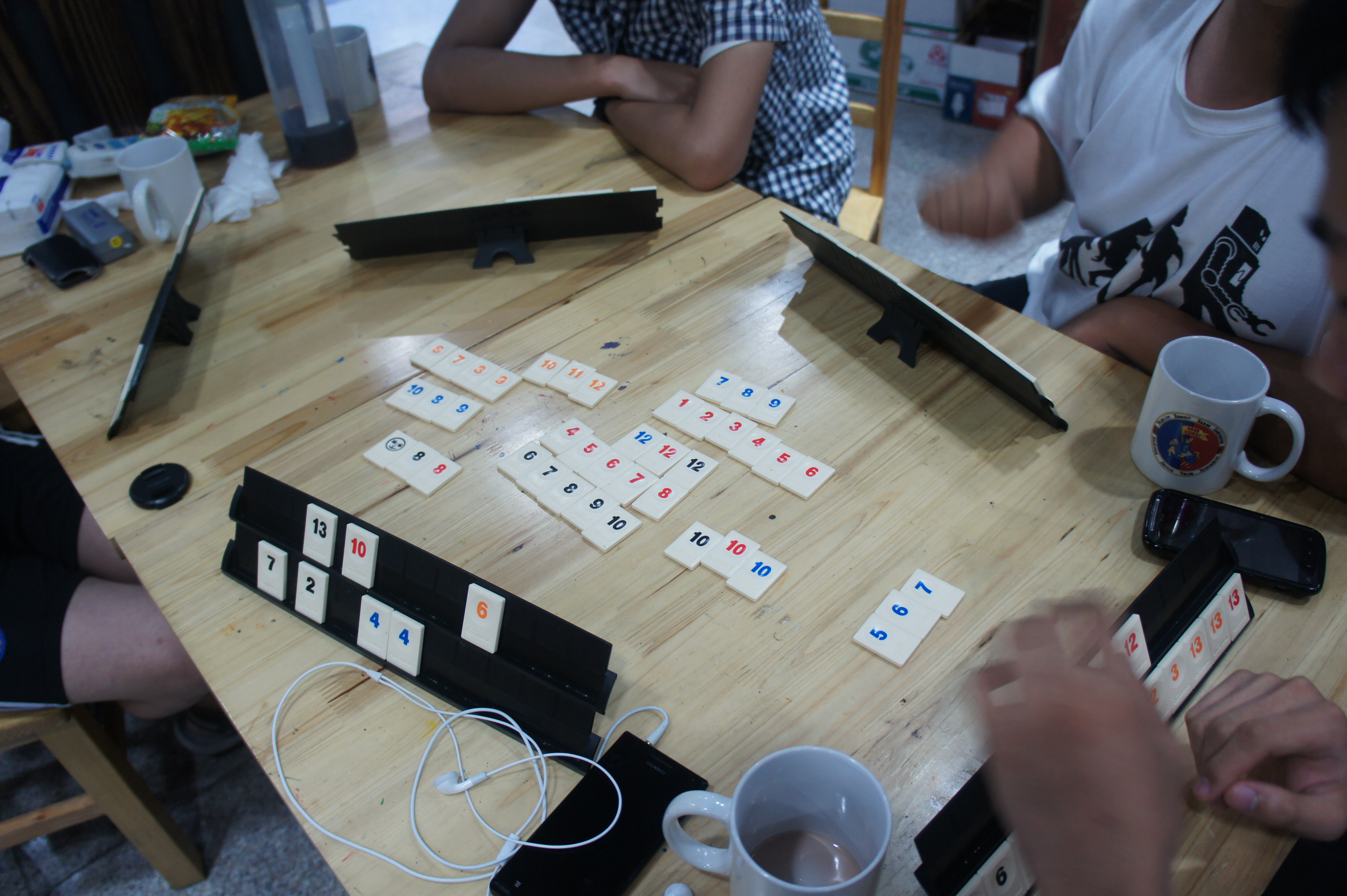 2012年7月21日参加上海维基双周聚会的同学们正在玩Rummikub。